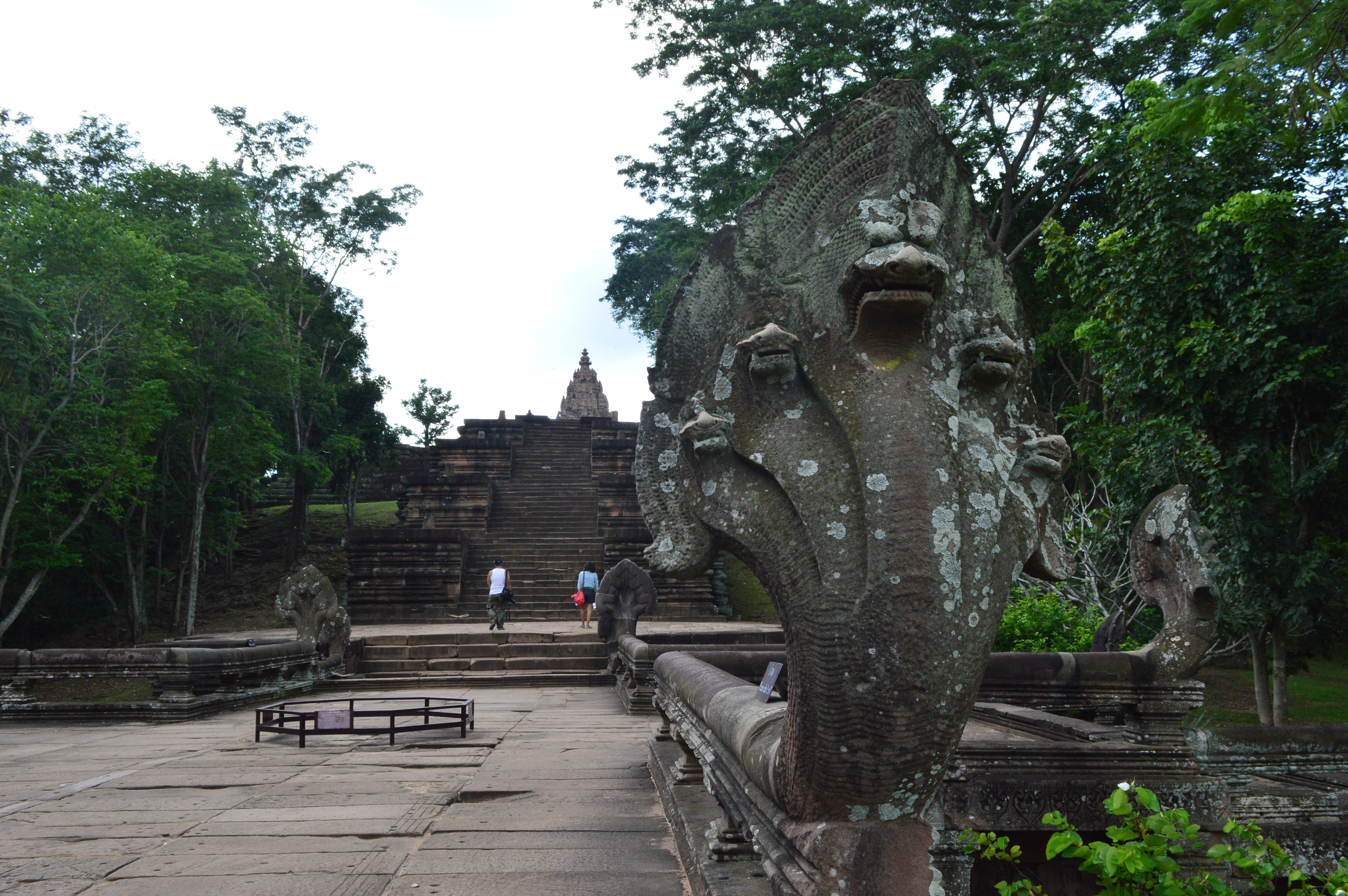 ปราสาทพนมรุ้ง